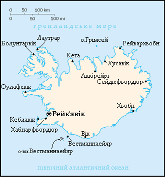 Мапа Ісландії.